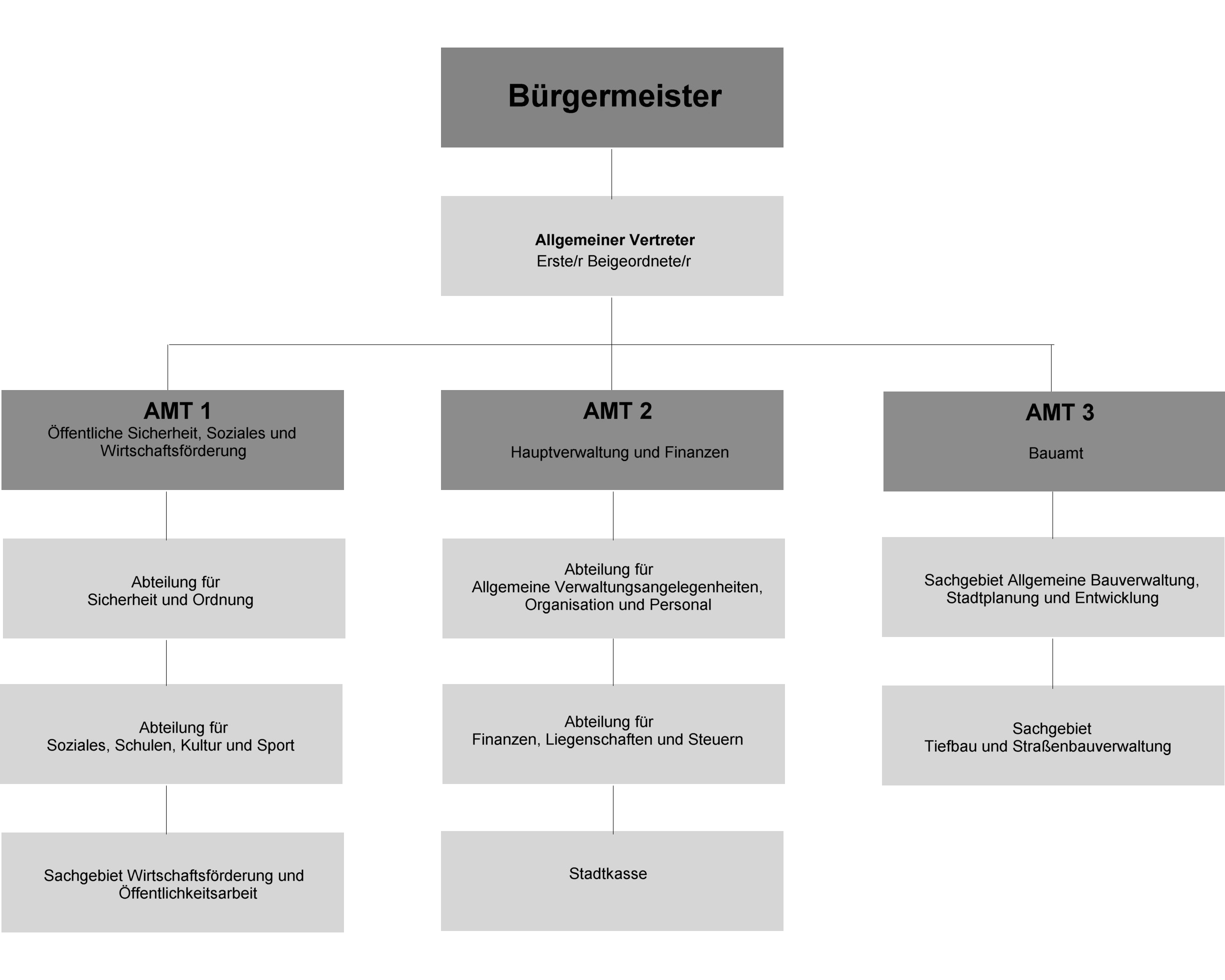 Struktur der Stadterwaltung